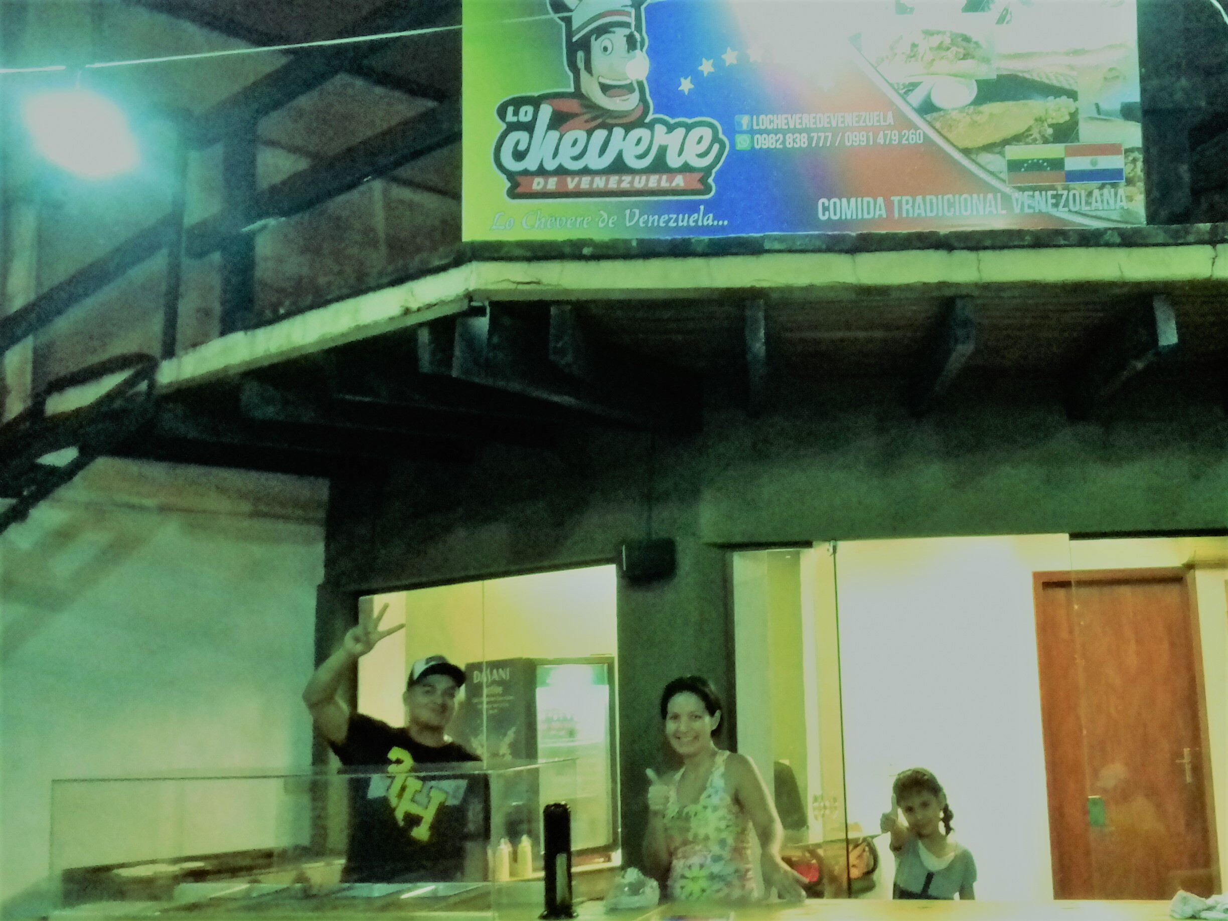 Puesto de comidas venezolanas perteneciente a una familia de ese origen, ubicado en la ciudad de Itauguá, Paraguay. la presencia de ciudadanos venezolanos en el Paraguay ha venido incrementándose desde el año 2016.